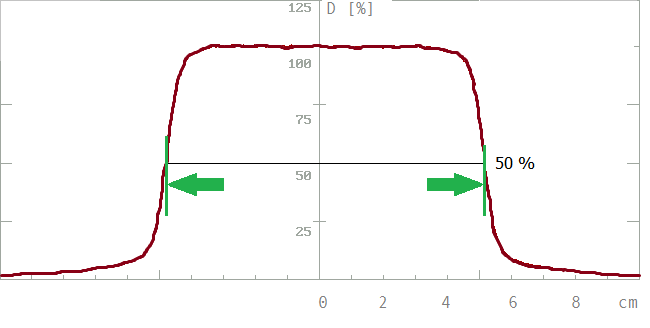 Strahlentherapie - Querprofil eines Bestrahlungsfeldes (Photonen) mit Einzeichnung der Feldgröße (grün)